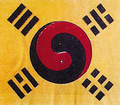 大淸國屬高麗國旗